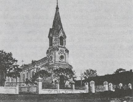 Костел Святих Ангелів-Хранителів